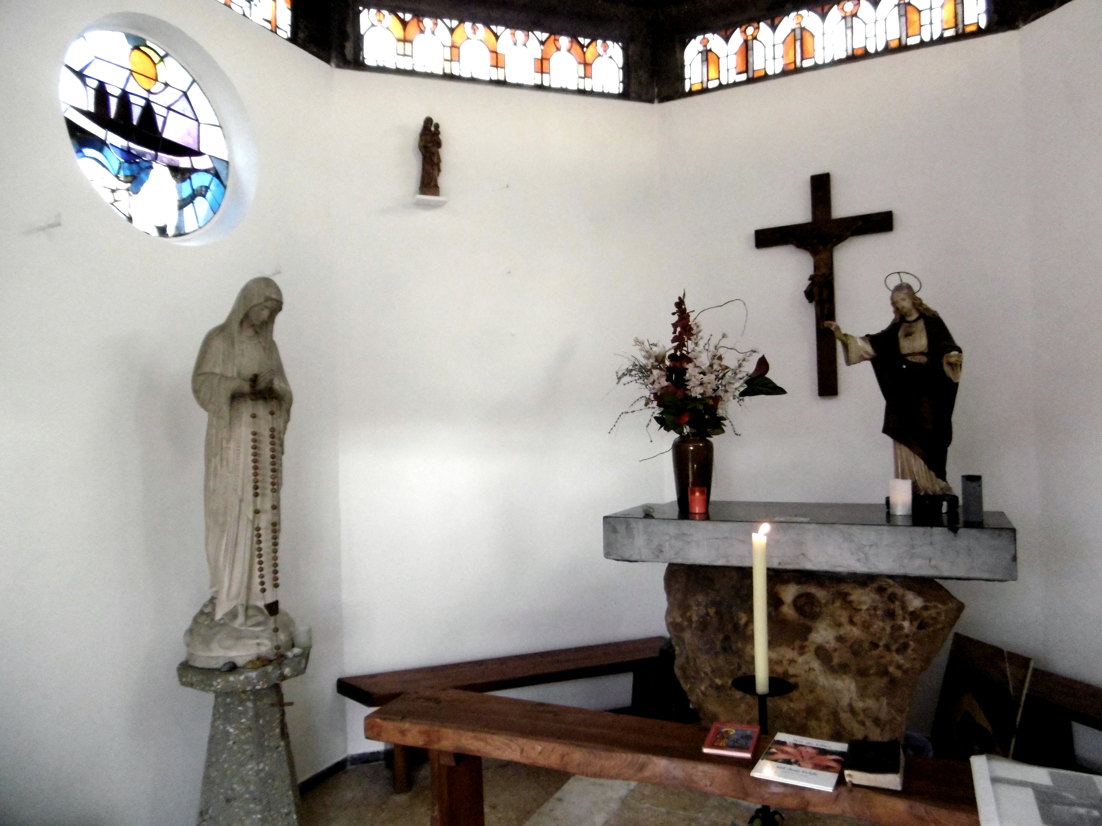 Innenansicht der Schneebergkapelle in Aachen-Laurensberg, linke Seite